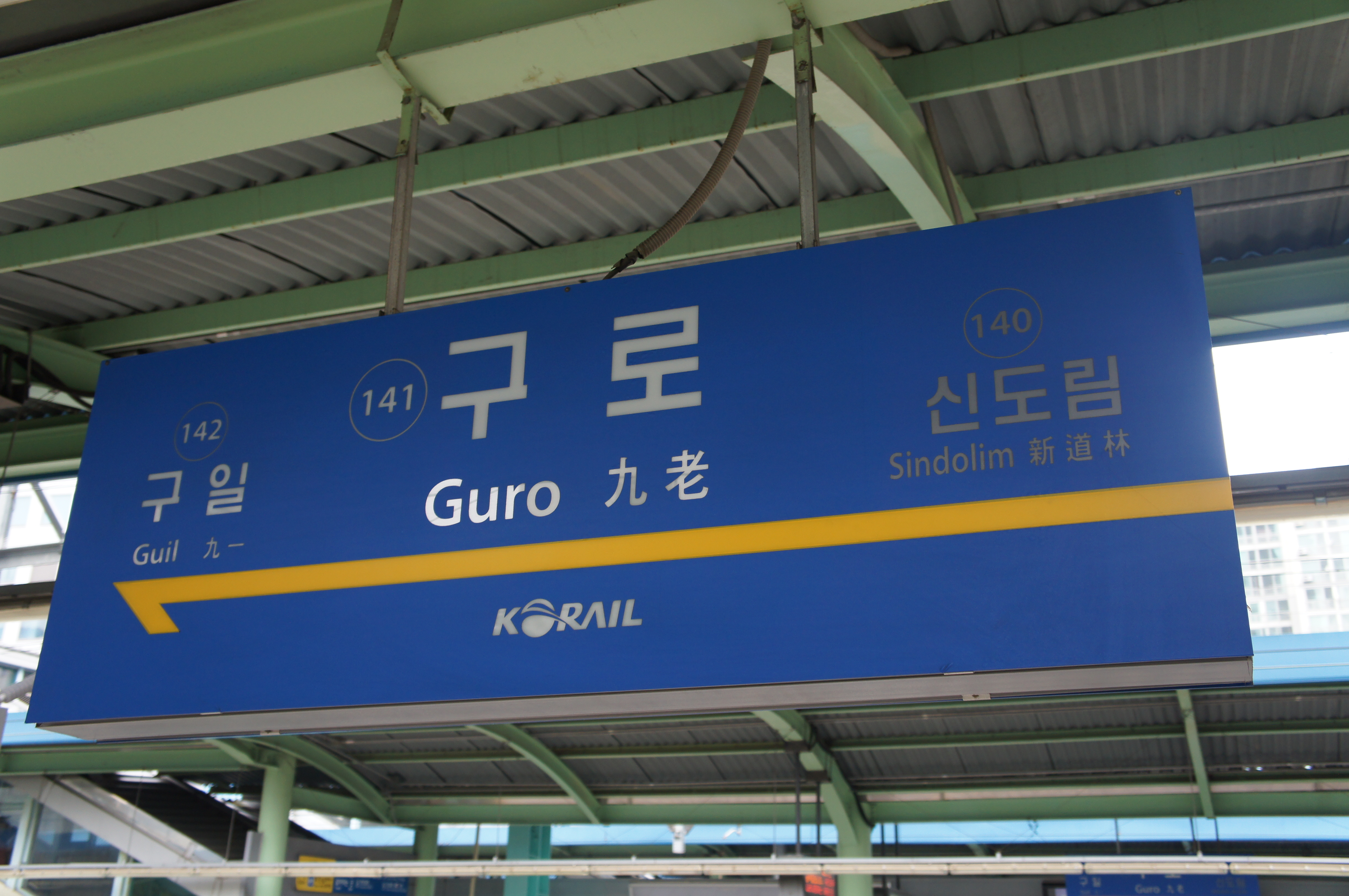 구로역 경인선 역명판